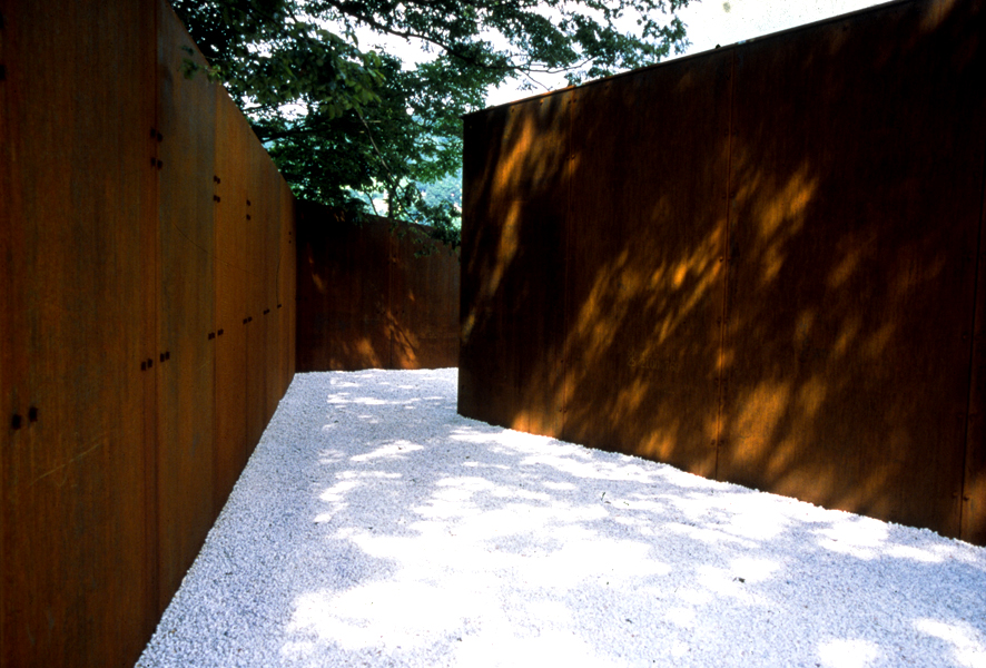 Casagrande & Rintala: Potemkin, Echigo-Tsumari, Japan 2003